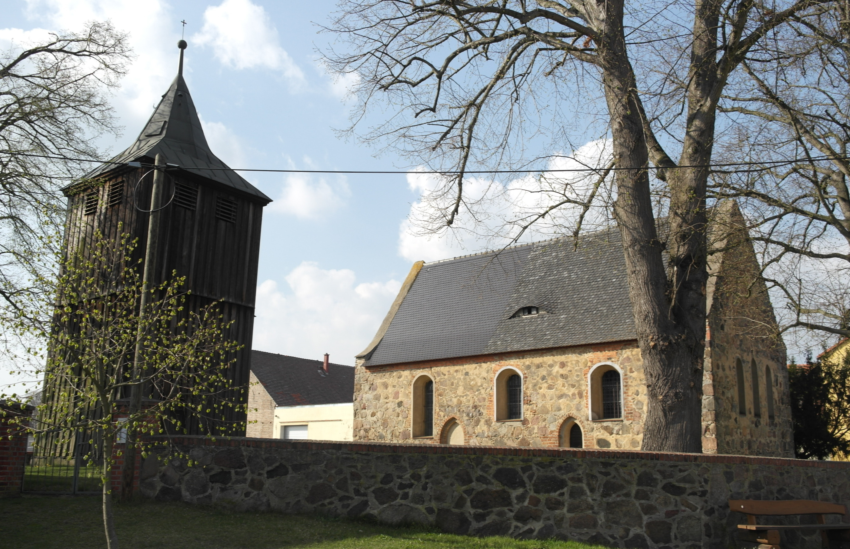 Liedekahle, Gemeinde Dahmetal, Brandenburg, Kirche mit Turm von Südosten